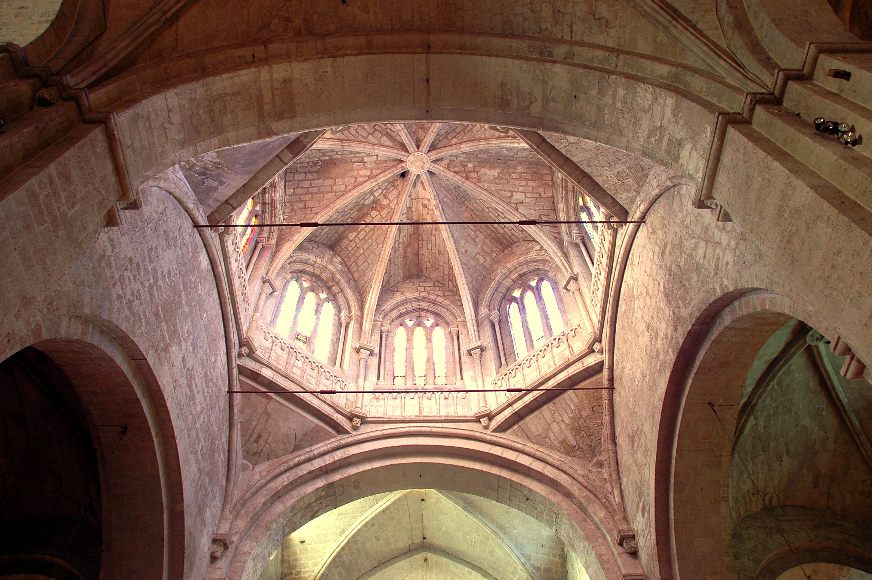 Monestir de Sant Cugat - Cimbori des de l'altar